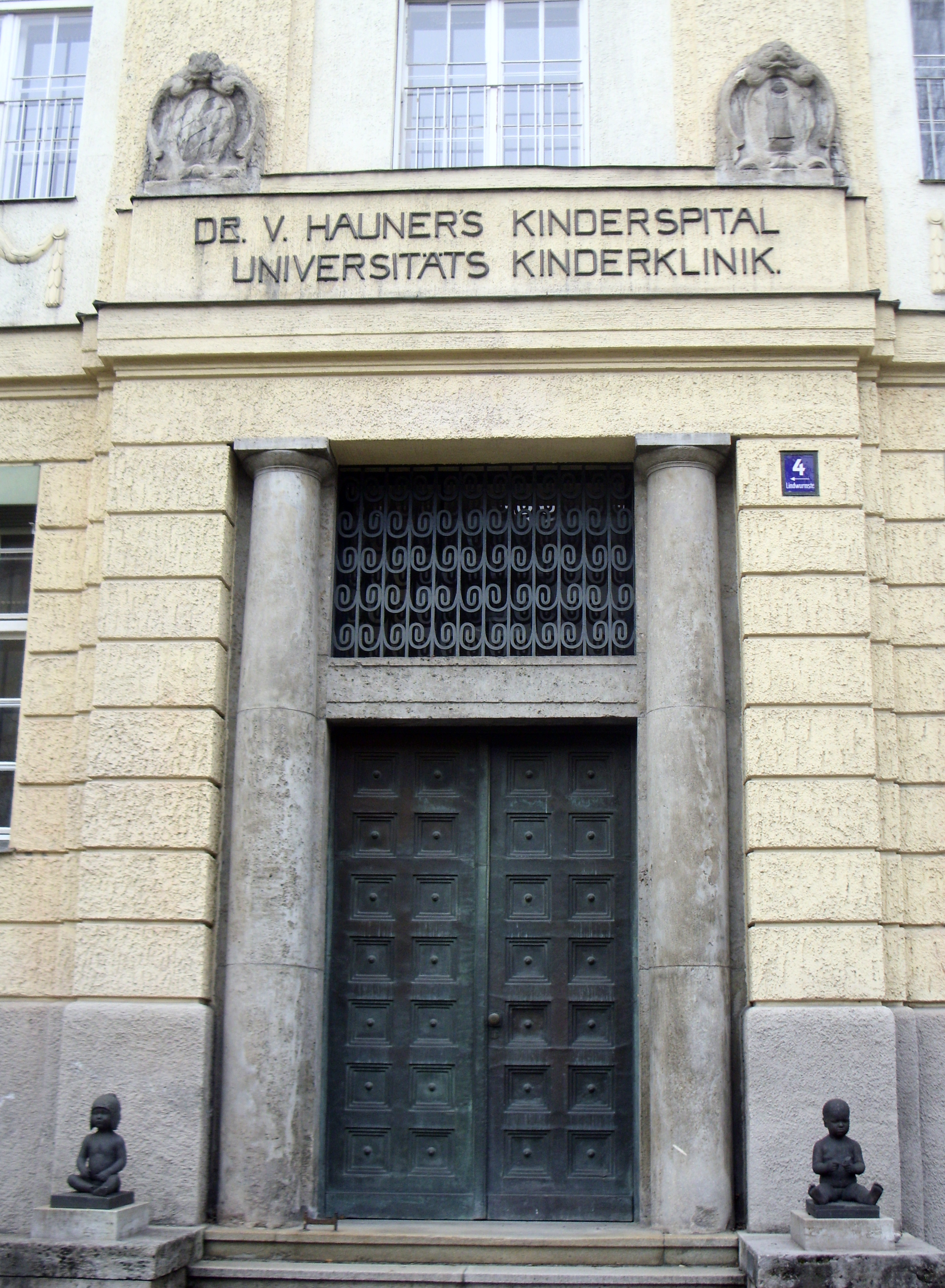 Eingang des ersten Gebäudes des Dr. von Haunerschen Kinderspitals